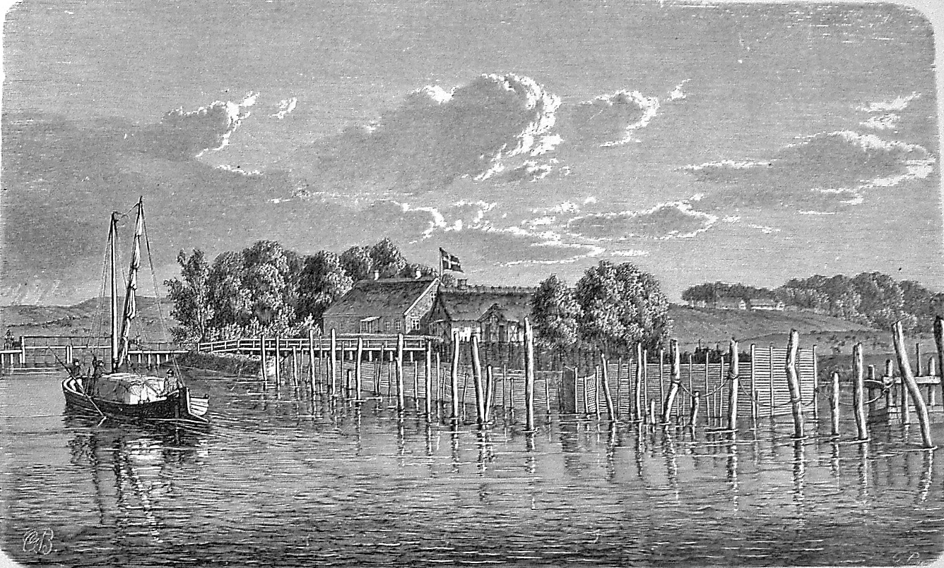 Laksegaard ved Frijsenvold, en tidligere hovedgård i Ørum Sogn, i det tidligere Galten Herred, Randers Amt, nu Favrskov Kommune, Region Midtjylland. Denmark